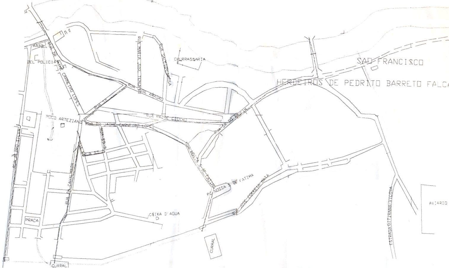 Mapa do mutirao cidade de deus Viçosa-AL